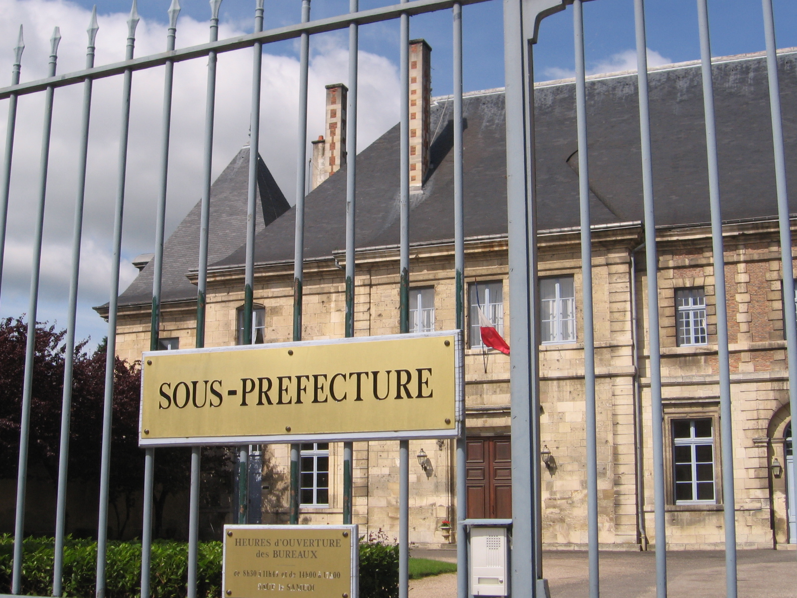 Verdun